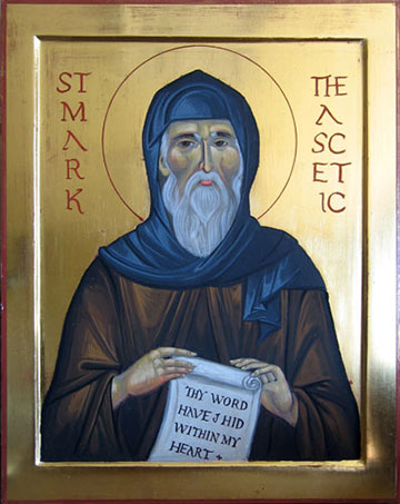 Преподобный Марк Подвижник